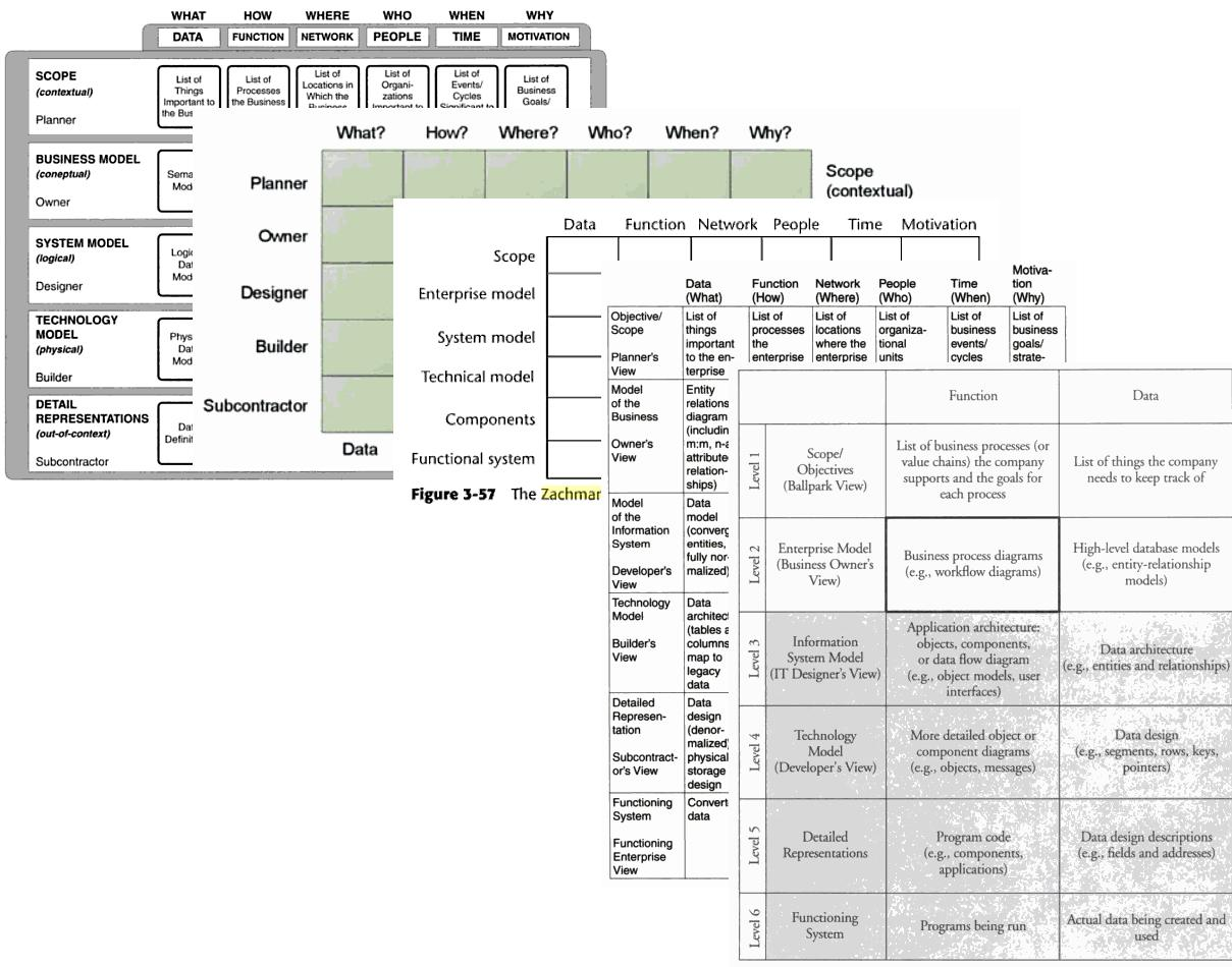 Zachman Framework Collage